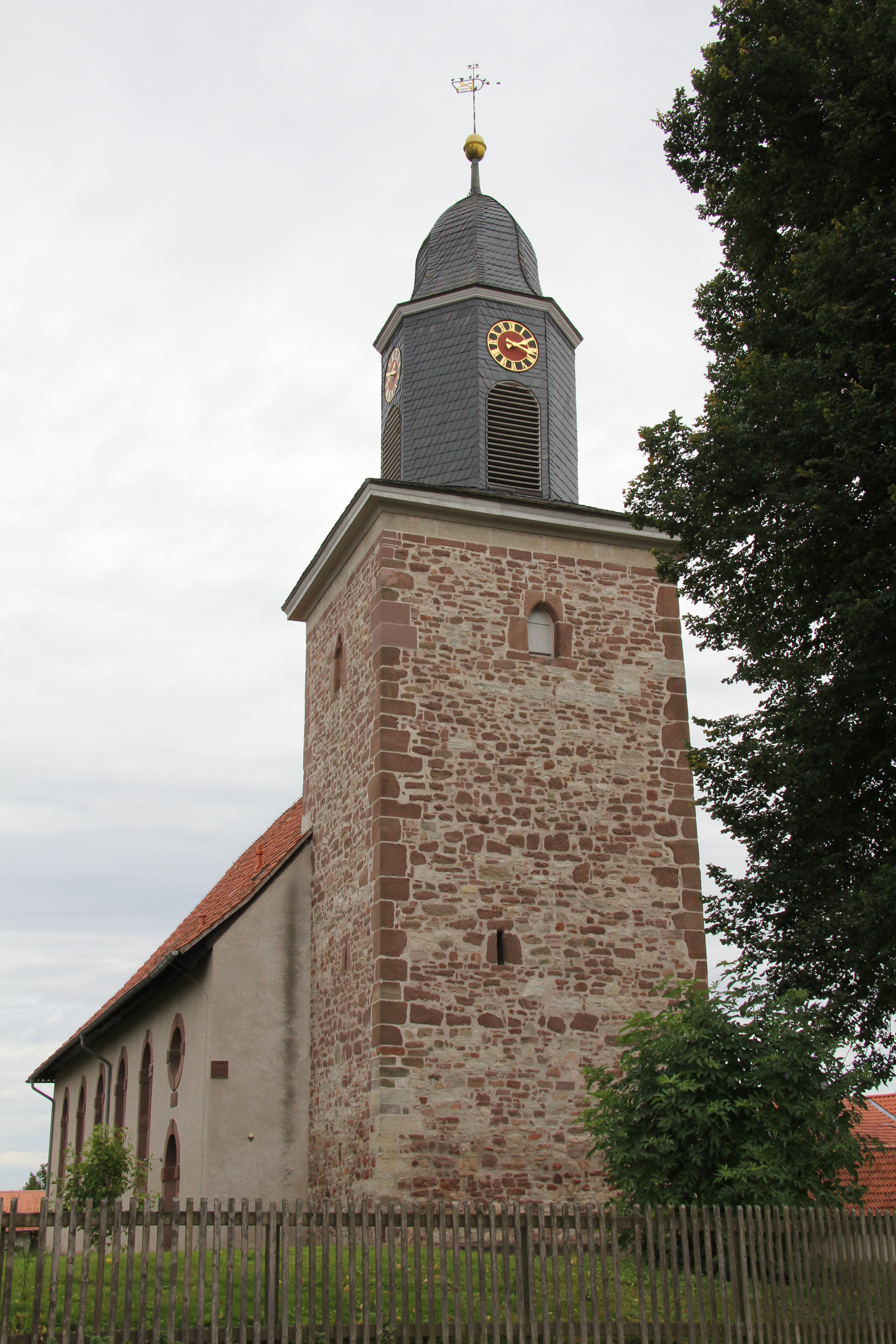 Die Hammenstedter St. Petri-Kirche